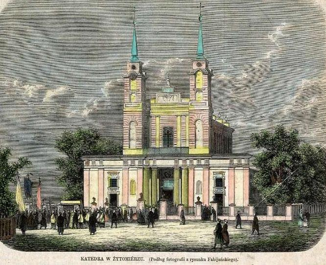 Католицька катедра у Житомирі, поч. 1870-х